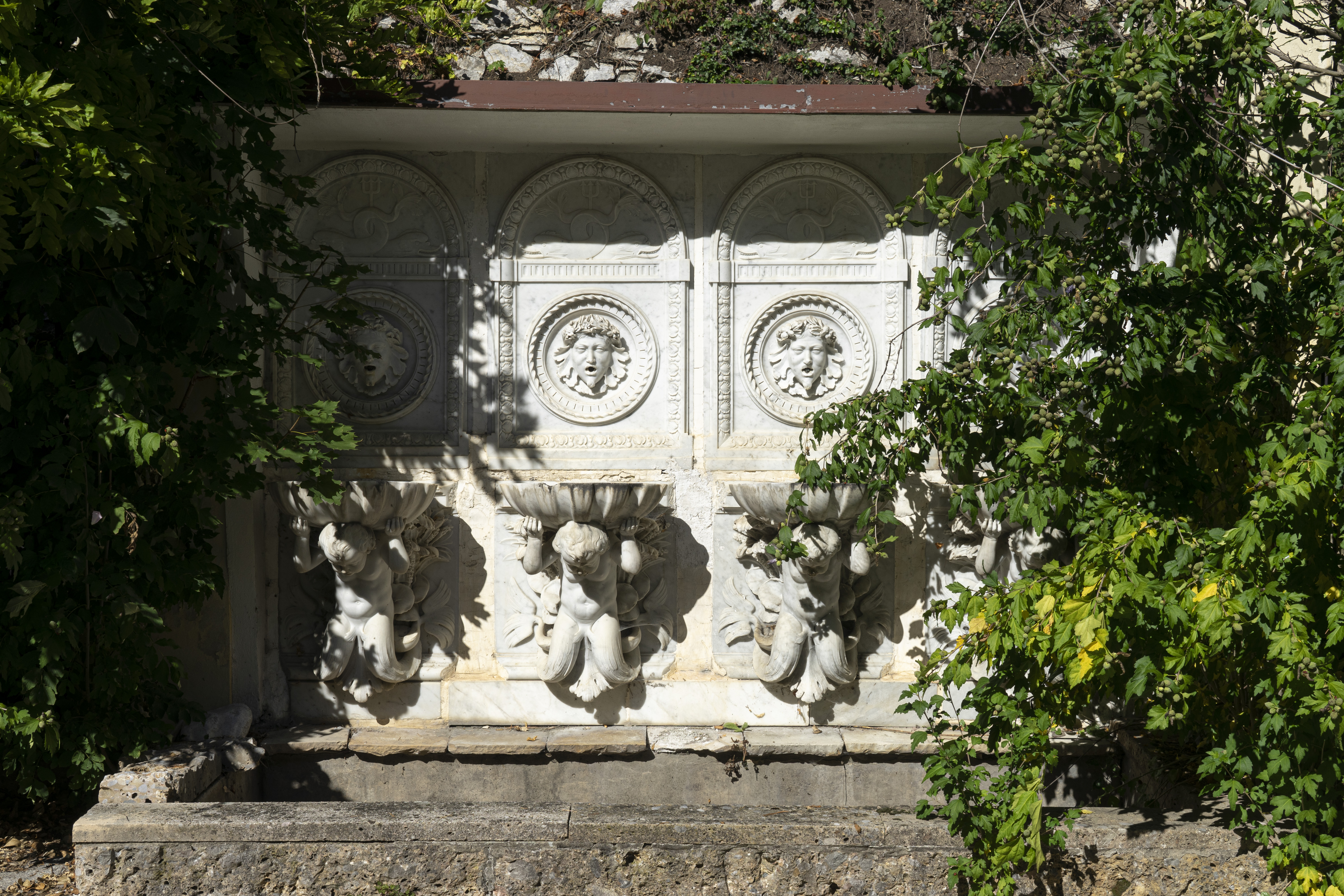 Brunnen Rudolfsvilla, Reichenau an der Rax